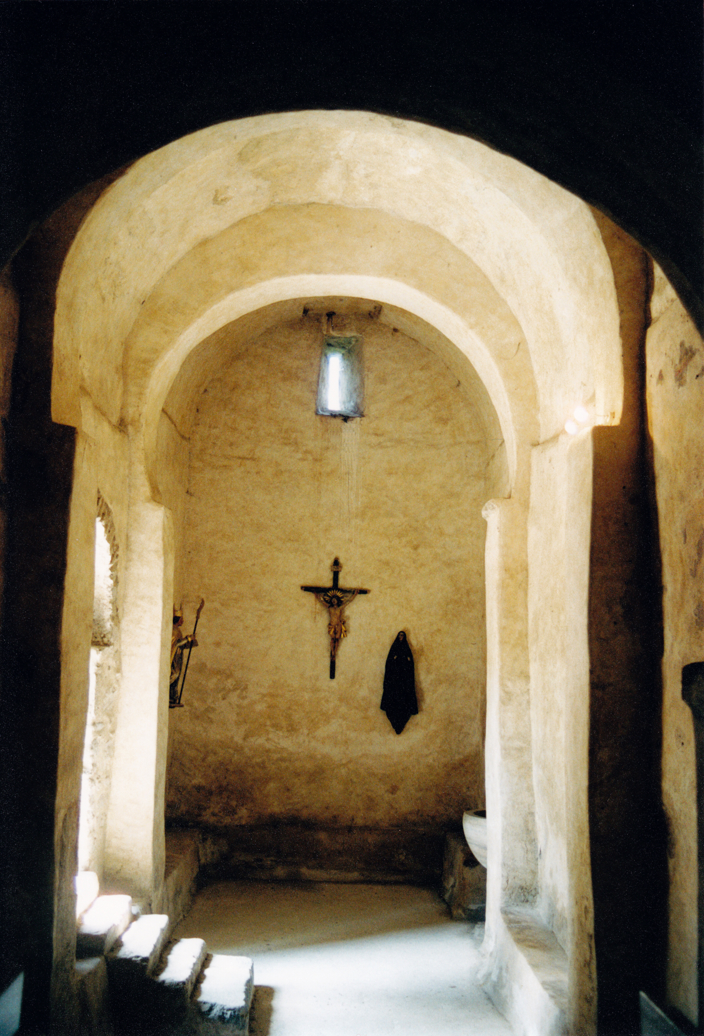 France - Roussillon - Saint-Martin-de-Fenollar : voûte et arcs doubleaux outrepassés